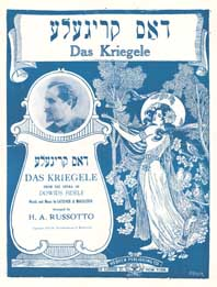 афиша Могулескоафиша к спектаклю «Кружечка» Могулеско